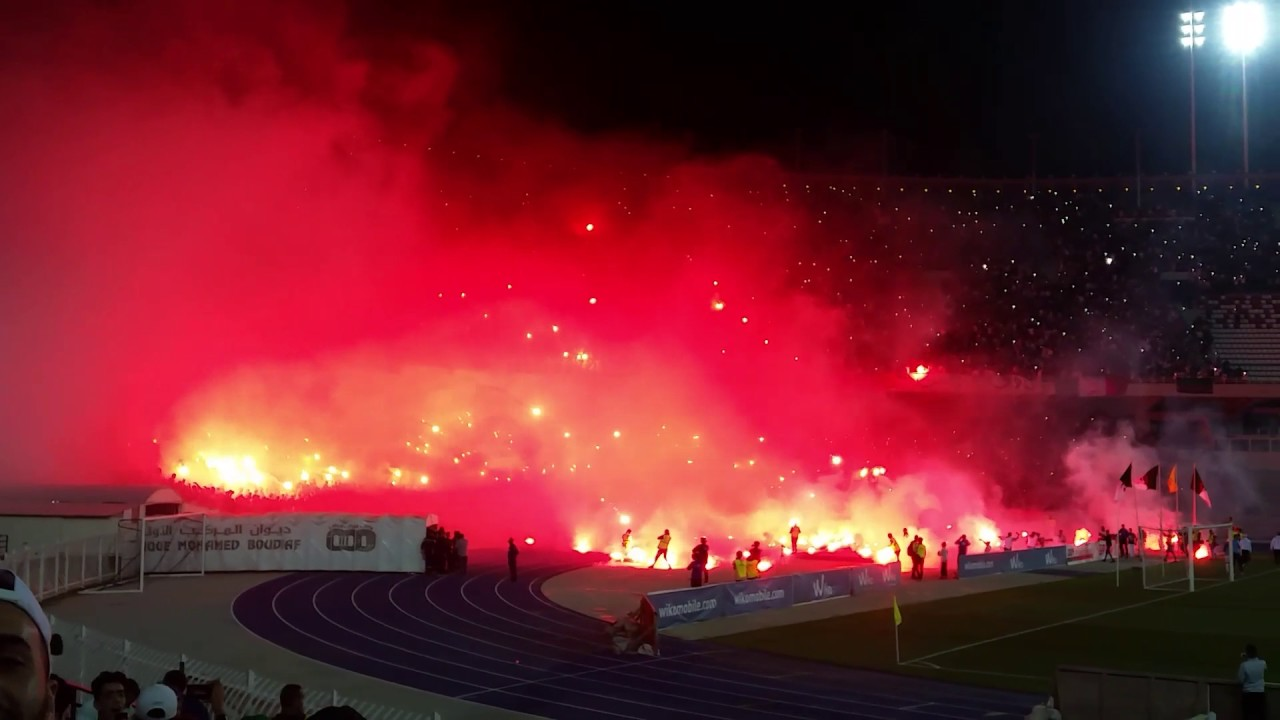 MCA fans vs CRB